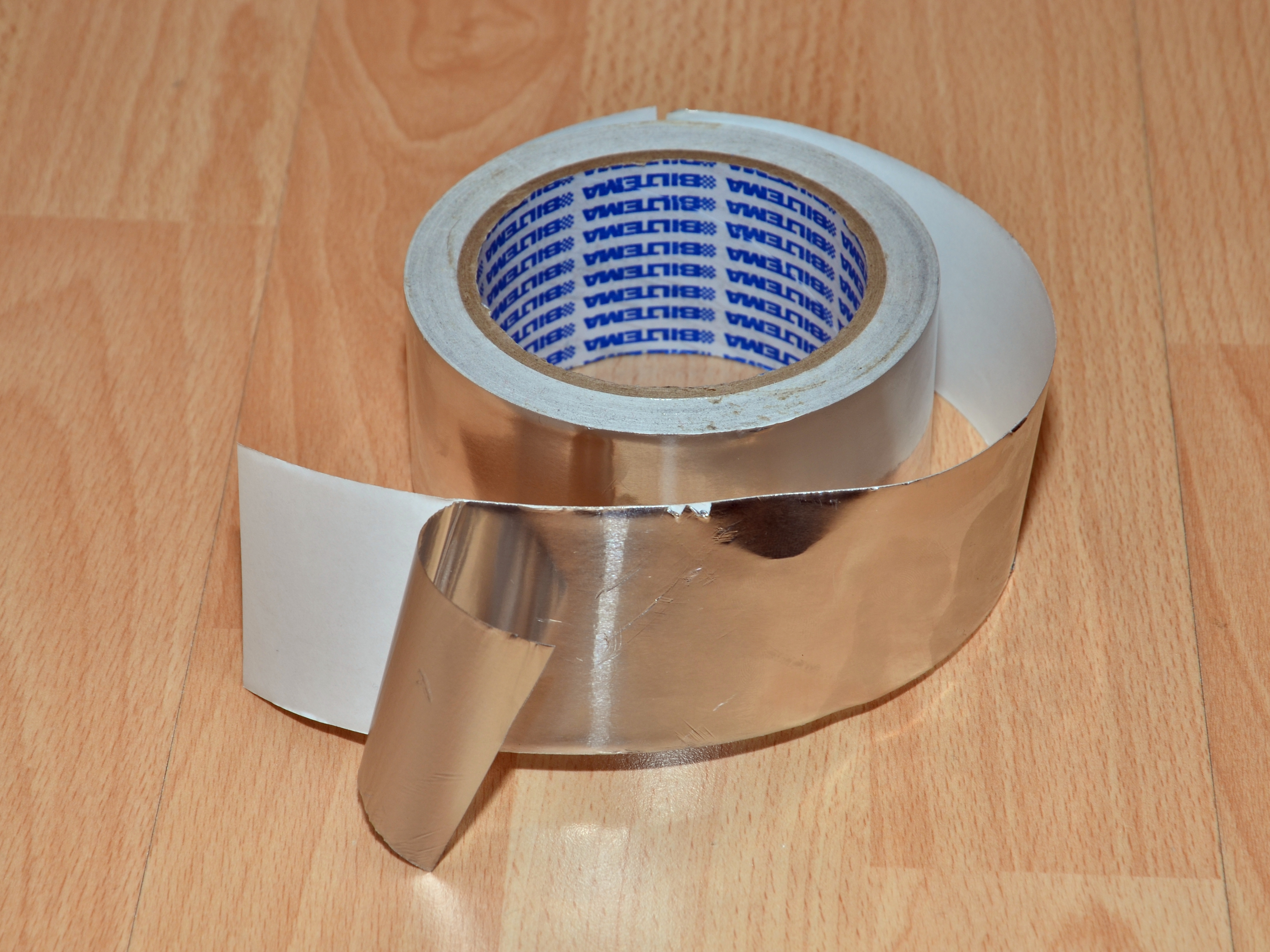 Aluminiumklebeband